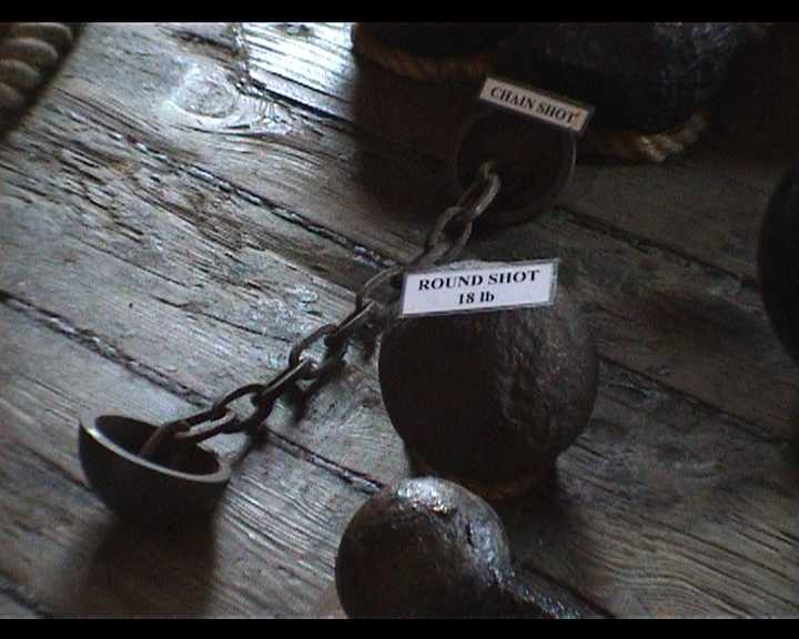 Kettengeschoss und Rundgeschoss für ein Schiffsgeschütz (which country? which museum?)